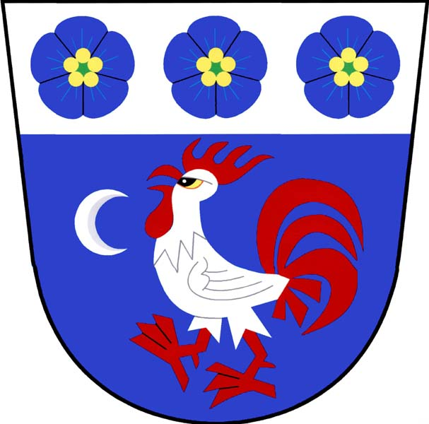 Znak obce Zábrodí